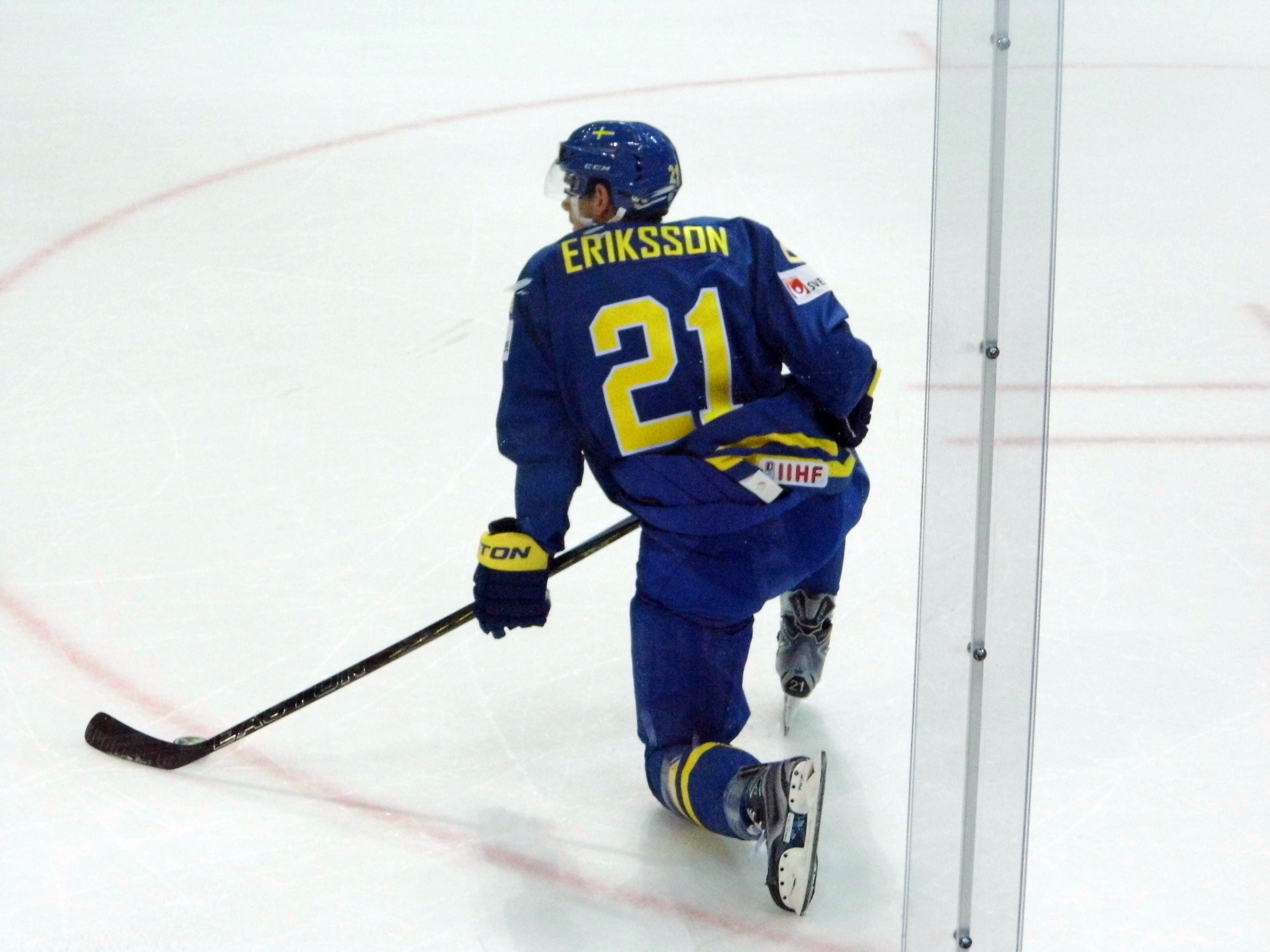 Loui Eriksson Sweden IIHF World Championship 2015 O2 Arena Prague vs. Latvia